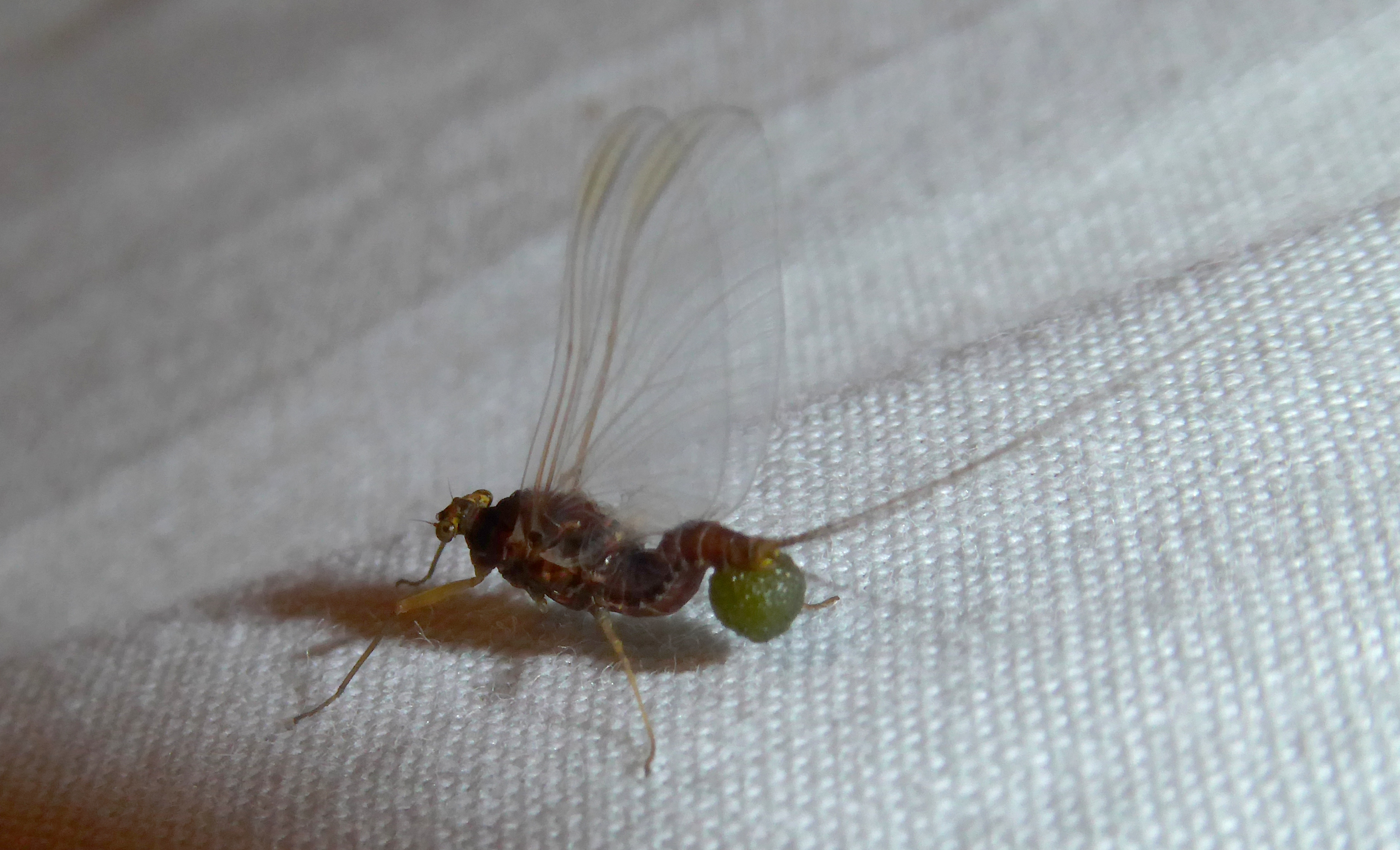 Weibchen einer Eintagsfliege der Familie Ephemerellidae mit Eipaket, Göttingen, Südniedersachsen. (Z.B. Ephemerella ignita